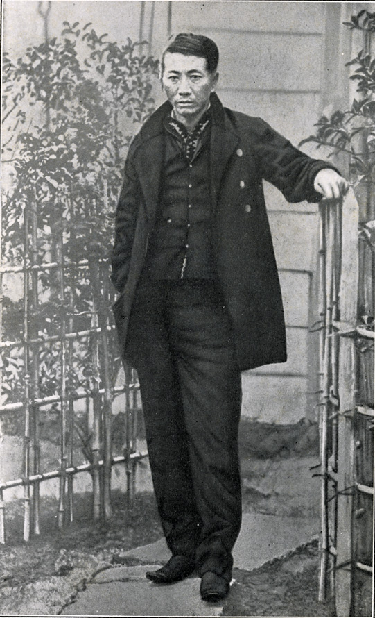 a Japanese man 矢田堀鴻 Yatabori Cou（1829-1887）